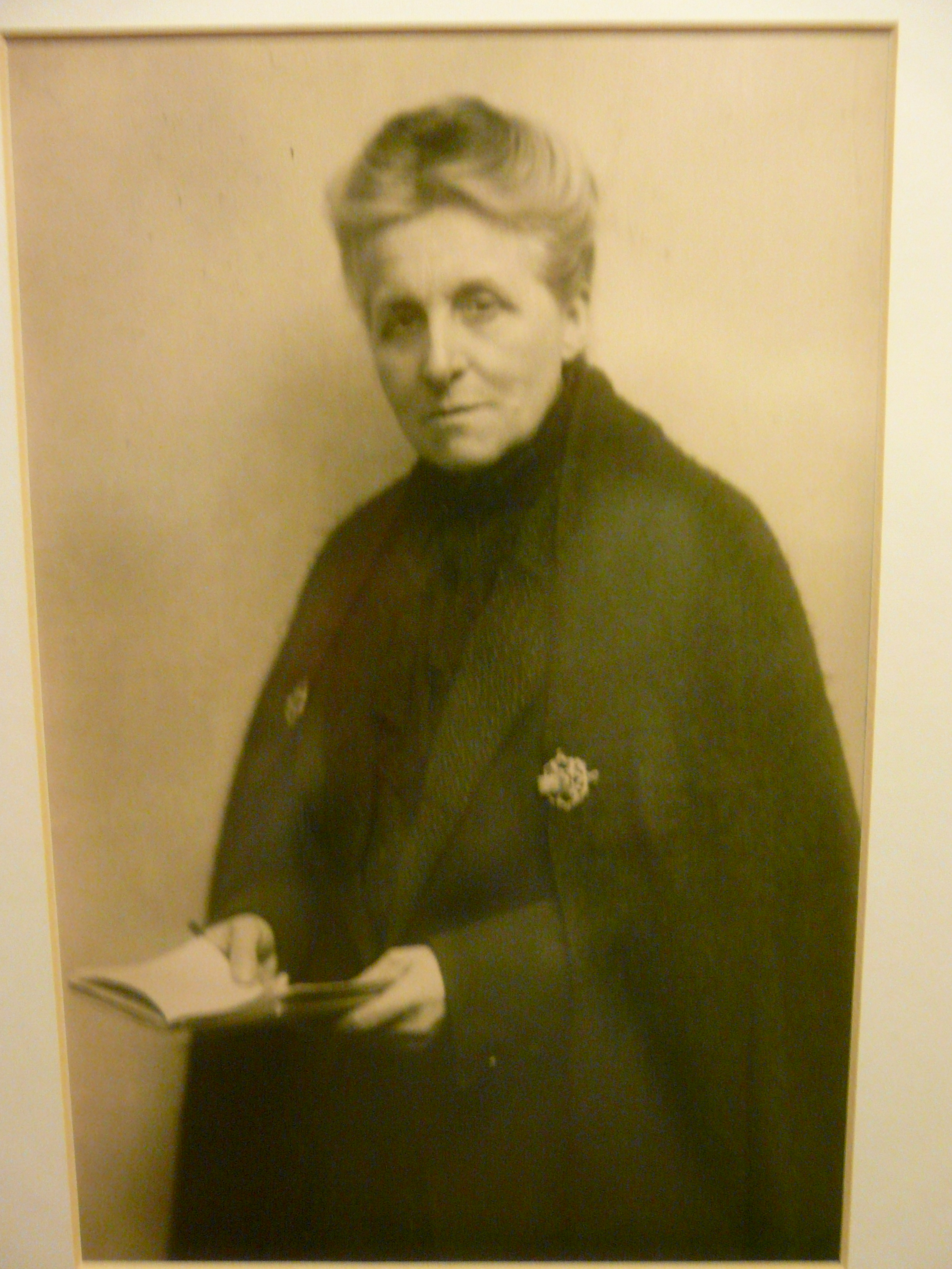 Zakopane. Zespół dworsko-parkowy w Kuźnicach, okolice i wnętrza. Hrabina Maria Zamoyska (1860-1937).